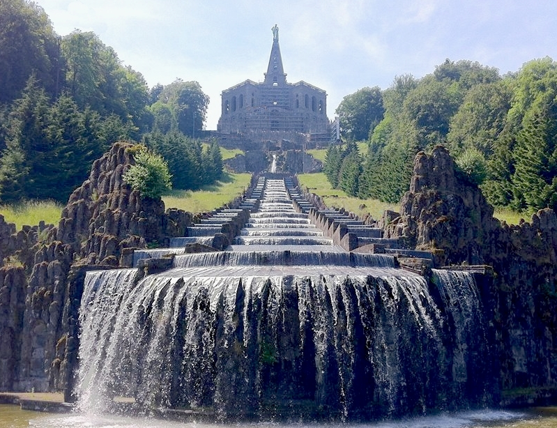 Wasserkaskaden im Bergpark Wilhelmshöhe in Kassel mit Herkules-Monument